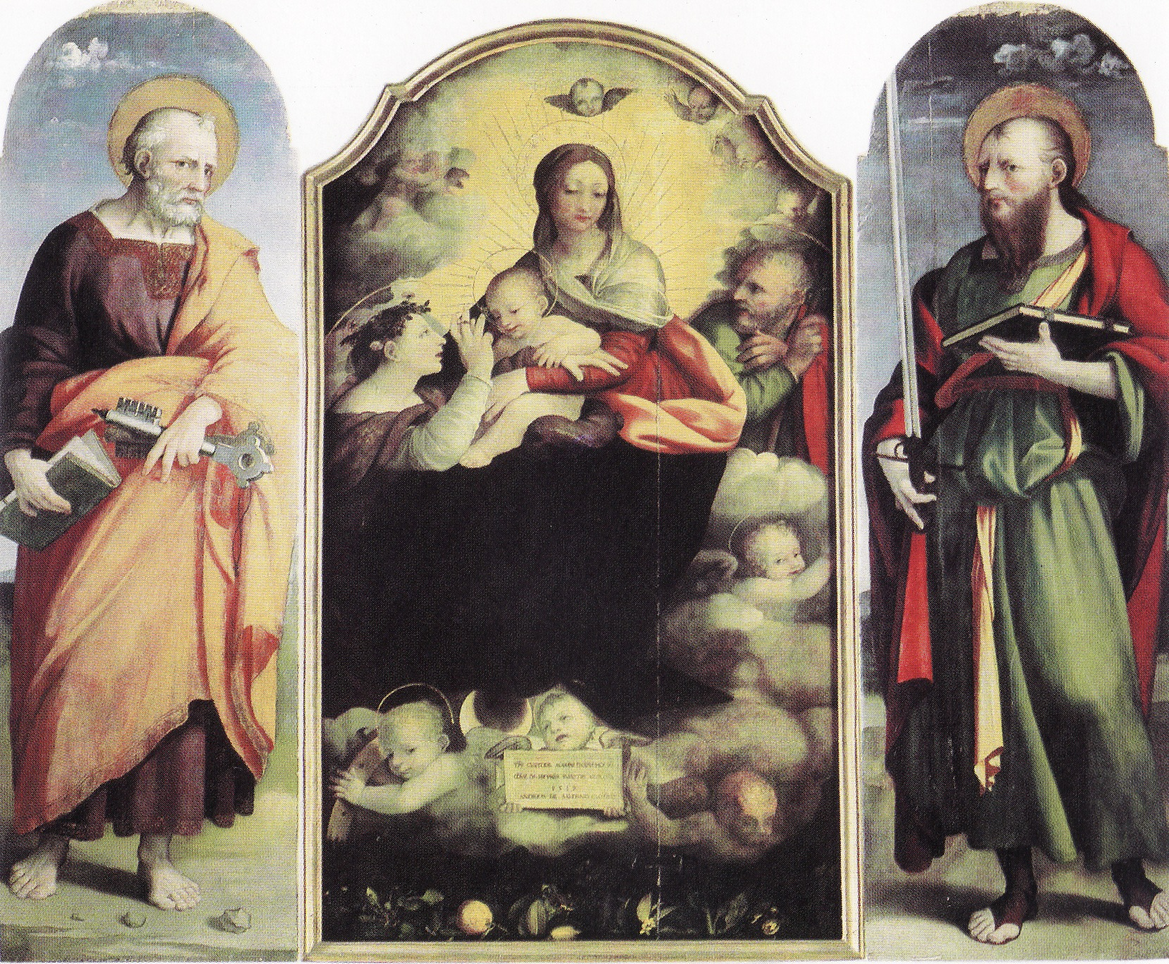 Polittico collocato sull'altare maggiore della chiesa di Sant'Antonio a Nocera Inferiore. Il